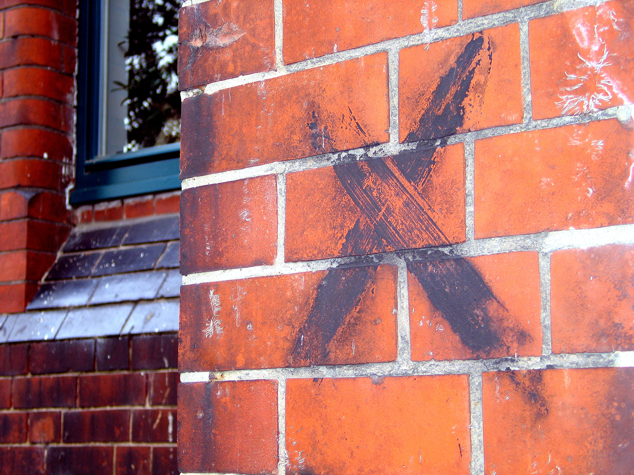 Während der Luftangriffe auf Hannover im Zweiten Weltkrieg wurde das Haus Mohrmann durch eine Fliegerbombe stark beschädigt. Anschließend wurde das runinierte Gebäude am Herrenhäuser Kirchweg 11 nach Leichen durchsucht und im Anschluß mit einem schwarzen Kreuz markiert ...